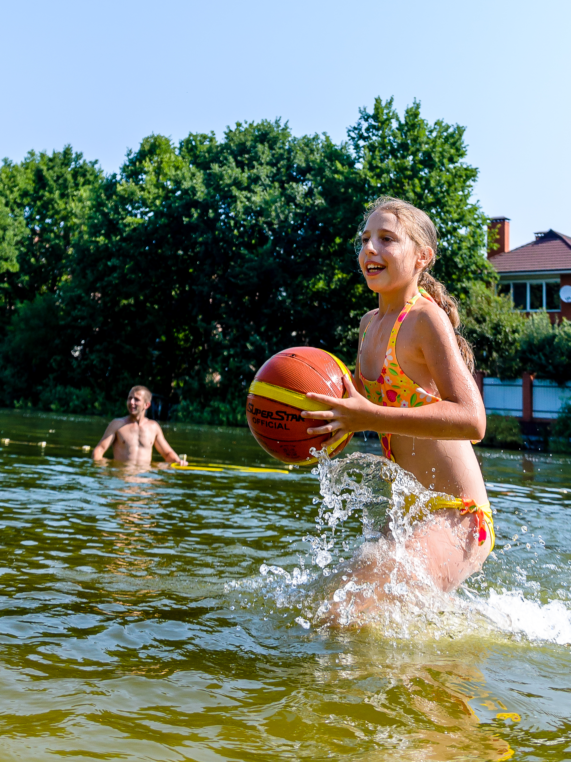 Купання